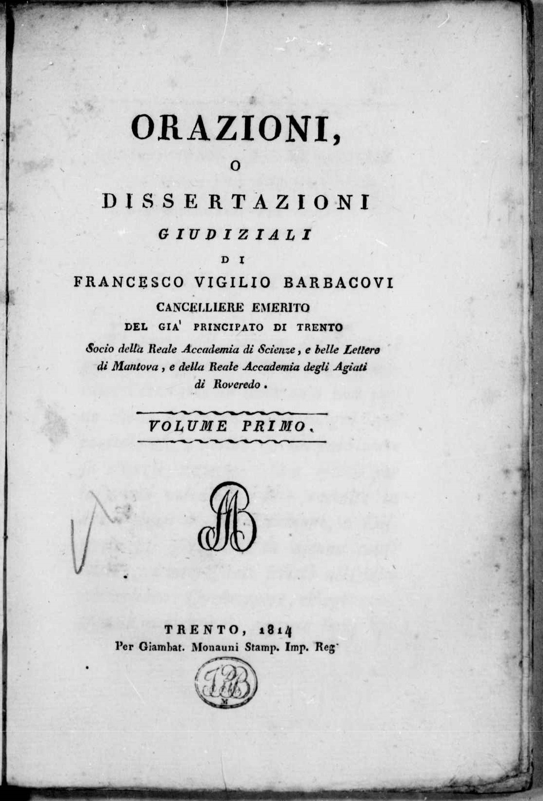 Frontespizio